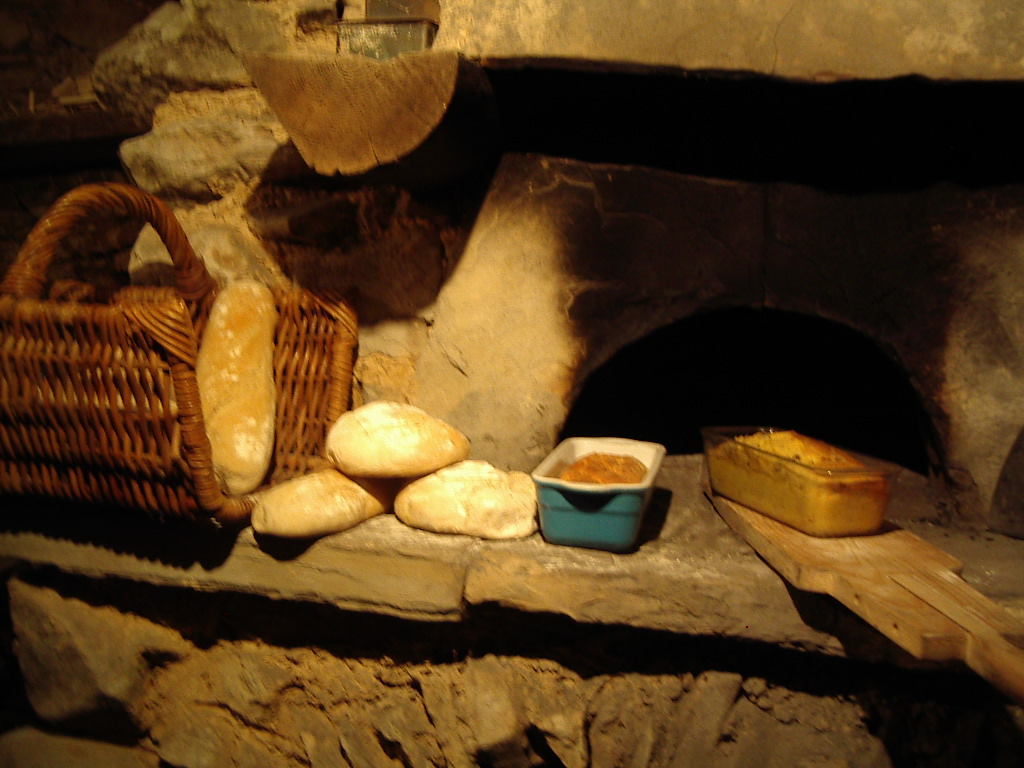 l'utilisation : pains et plats